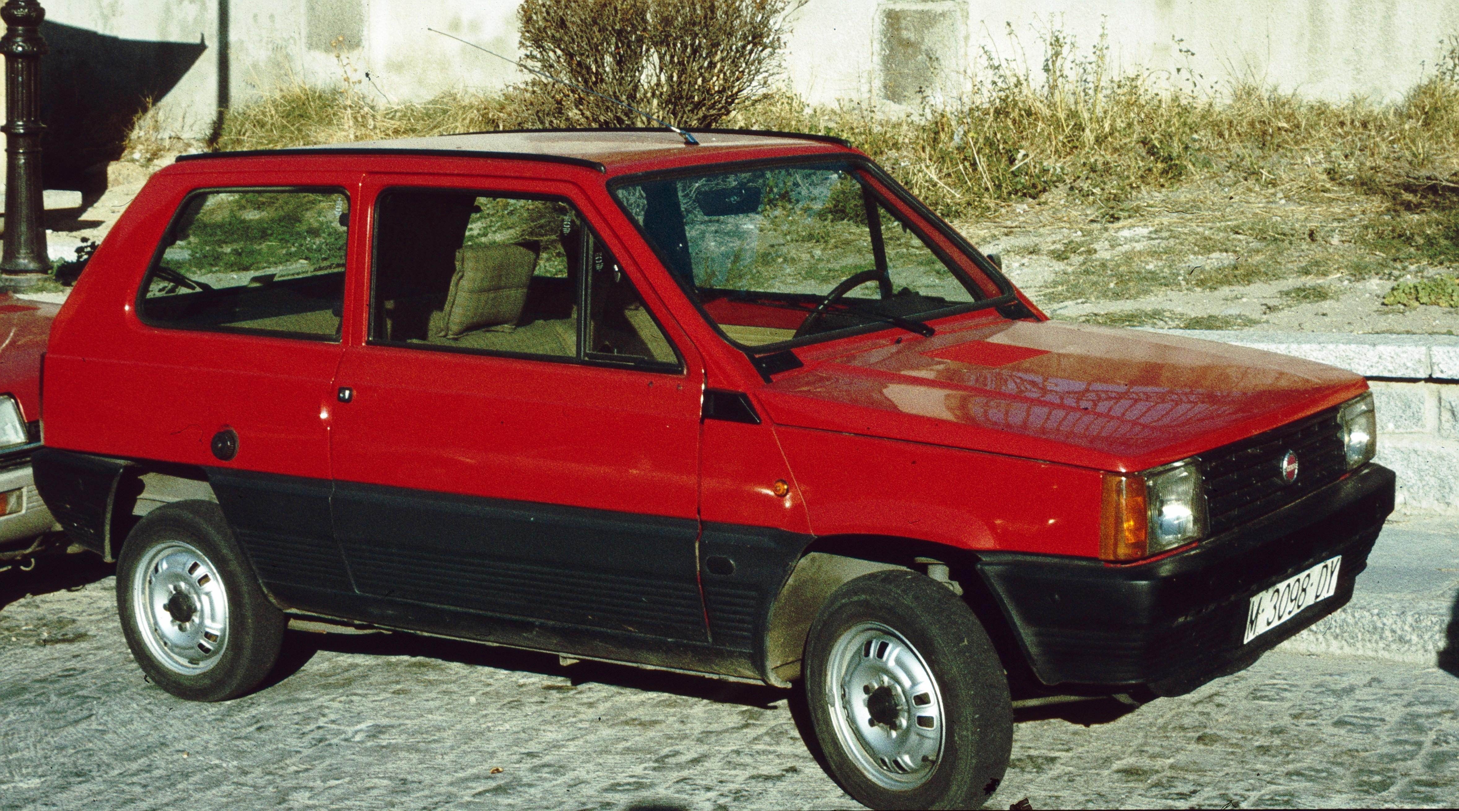 SEAT Panda, 1985 Madrid